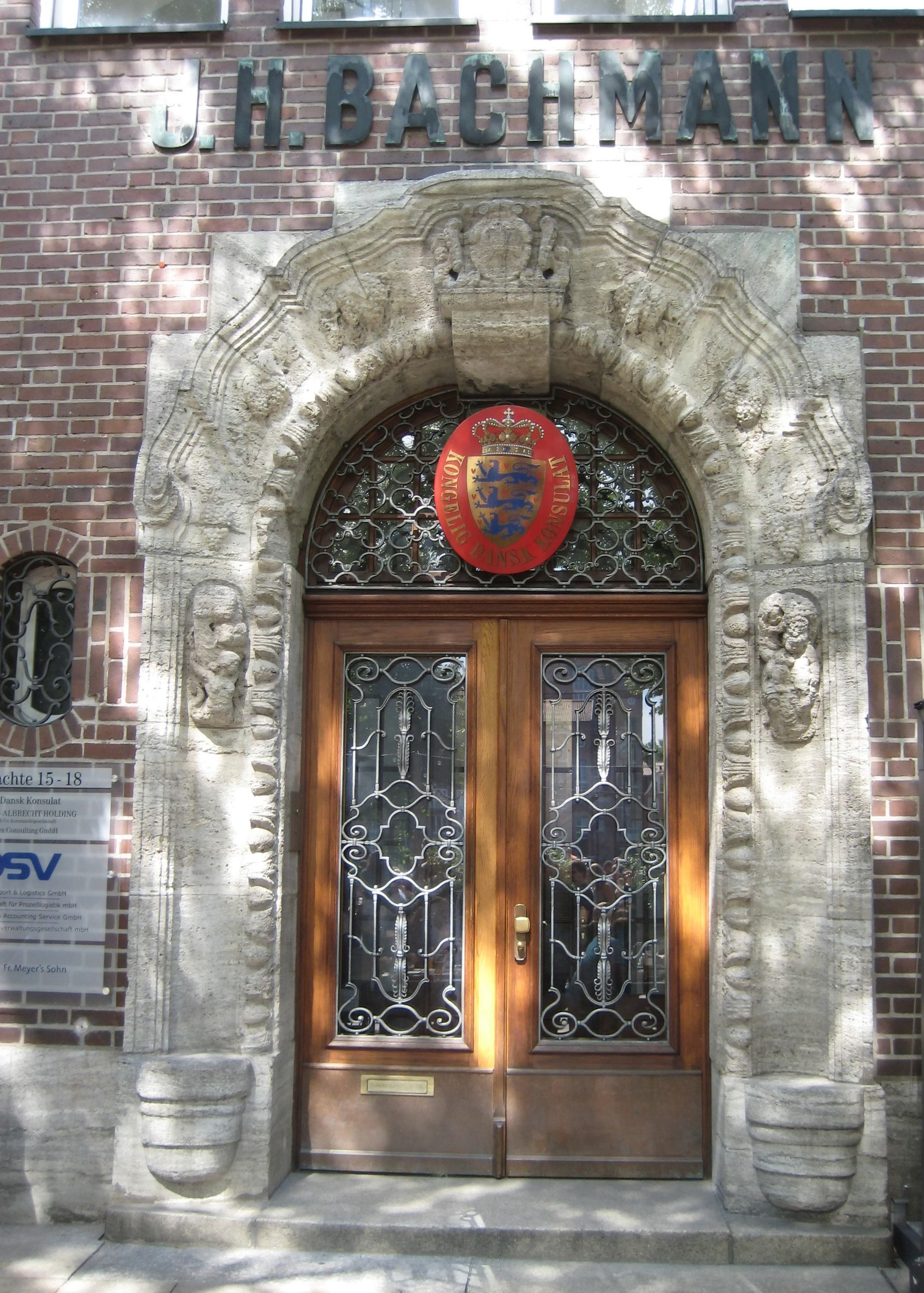 Eingangsportal des „Bachmann-Hauses“ an der Schlachte 15–18 in Bremen. Früheres Kontorhaus der ehemaligen Bremer Handelsspedition J.H. Bachmann, 1913 erbaut und nach Kriegszerstörungen 1948 in der alten Form wiederaufgebaut. Über dem Portal befindet sich noch der Firmenname des seit 2006/07 nicht mehr bestehenden Unternehmens. In dem Gebäude befindet sich das dänische Honorarkonsulat für die Freie Hansestadt Bremen (siehe Konsulatsschild im Bogen des Eingangsportals).Das abgebildete Objekt ist ein geschütztes Kulturdenkmal in der Freien Hansestadt Bremen, mit der Nr. 0857 beim Landesamt für Denkmalpflege registriert.